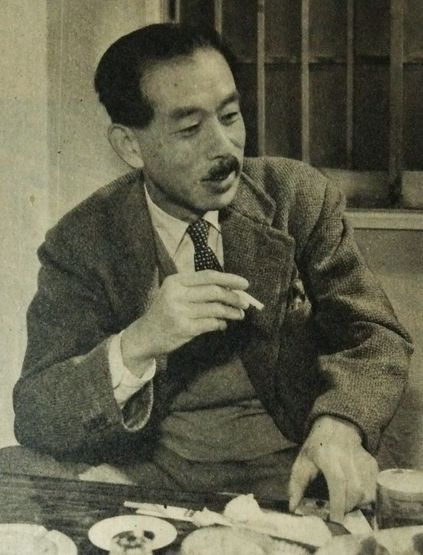 邦枝完二